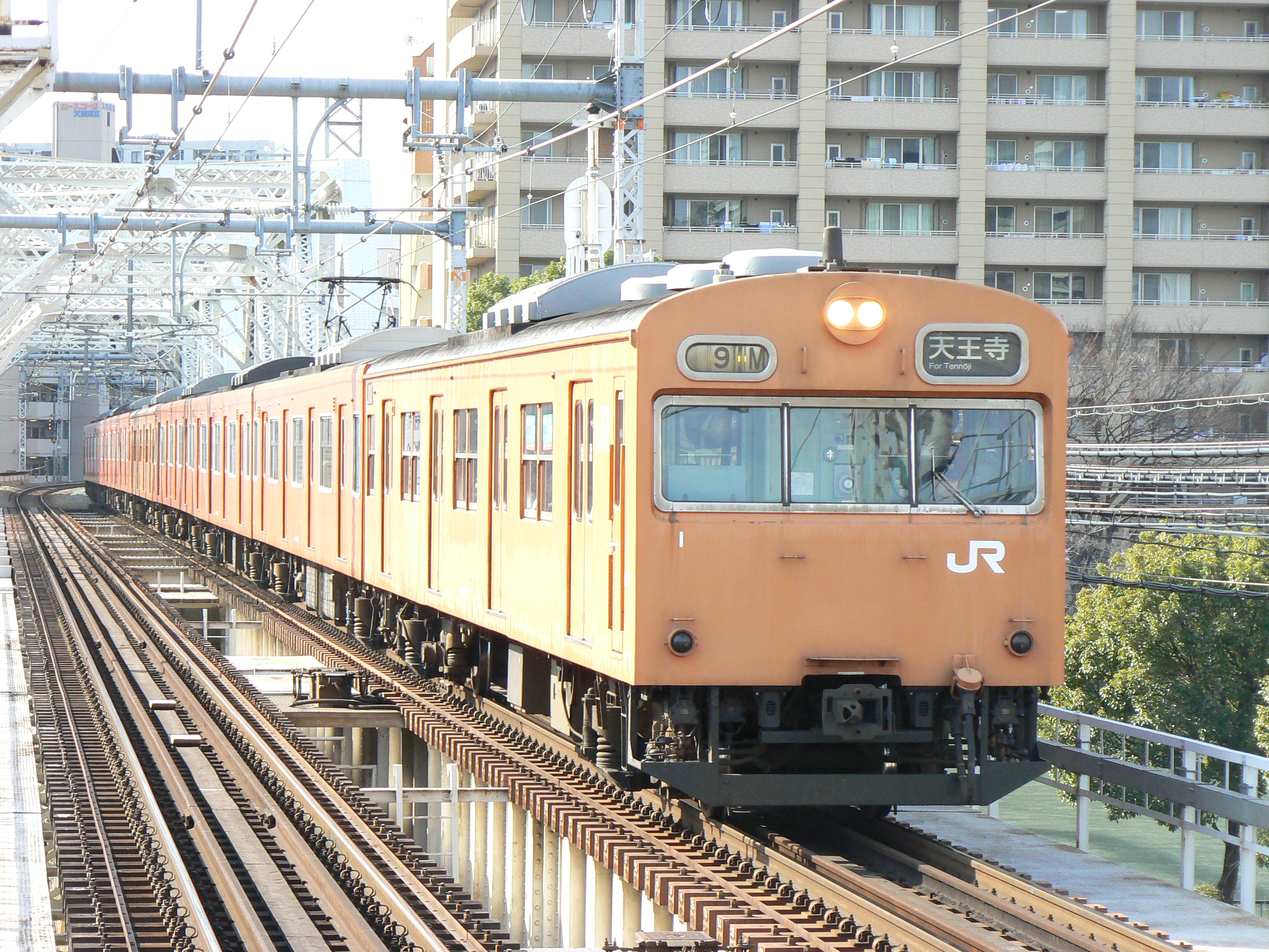 国鉄103系 オレンジ色 (クハ103-1)